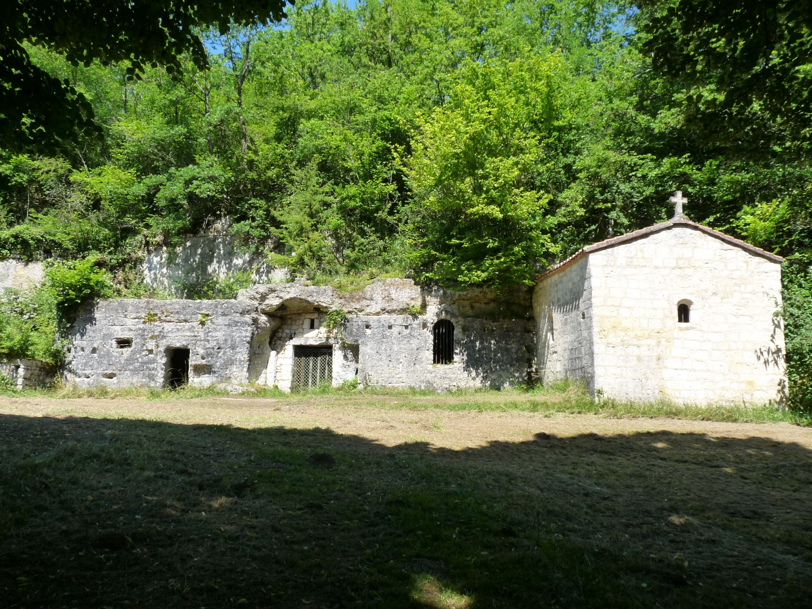 Ermitage de Bellevau, Sers, Charente, France